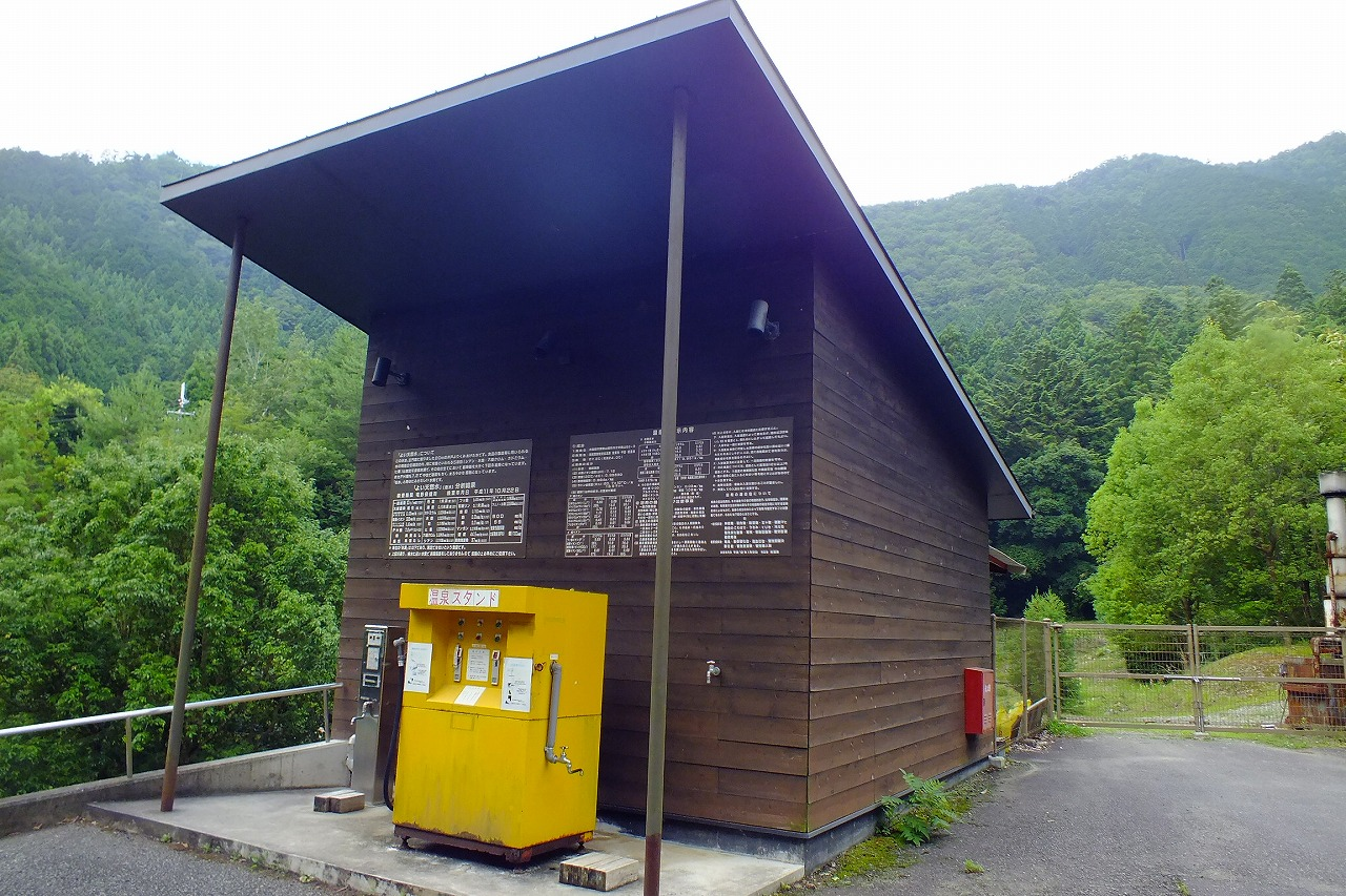 しそうよい温泉 温泉スタンド